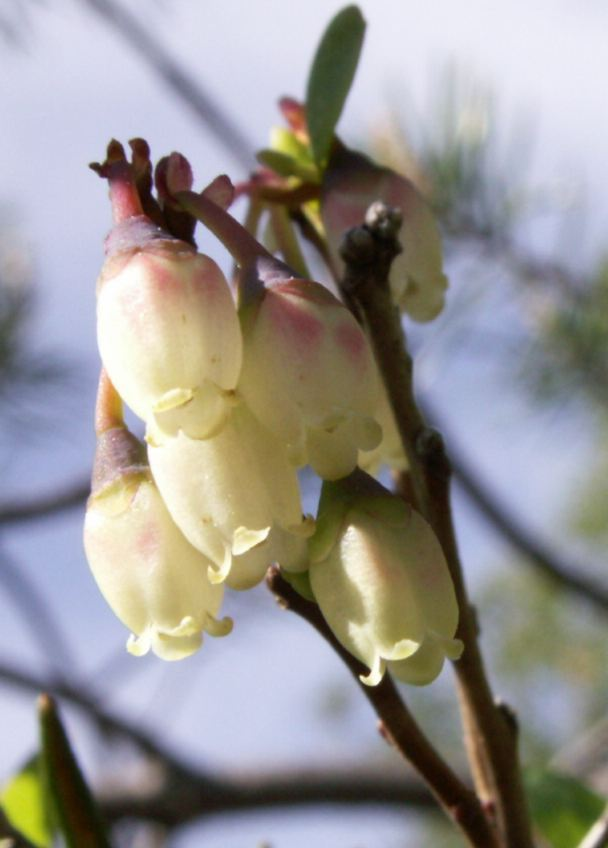 Vaccinium uliginosum, flowers